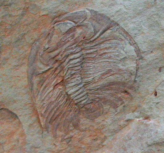 Eccaparadoxides mediterraneus (antes clasificado como E. brachyrachis). Trilobites del Cámbrico medio de Murero (Zaragoza, España). Ejemplar del Museo Geominero de Madrid. (Ver: Dies Álvarez, et al., 2010)